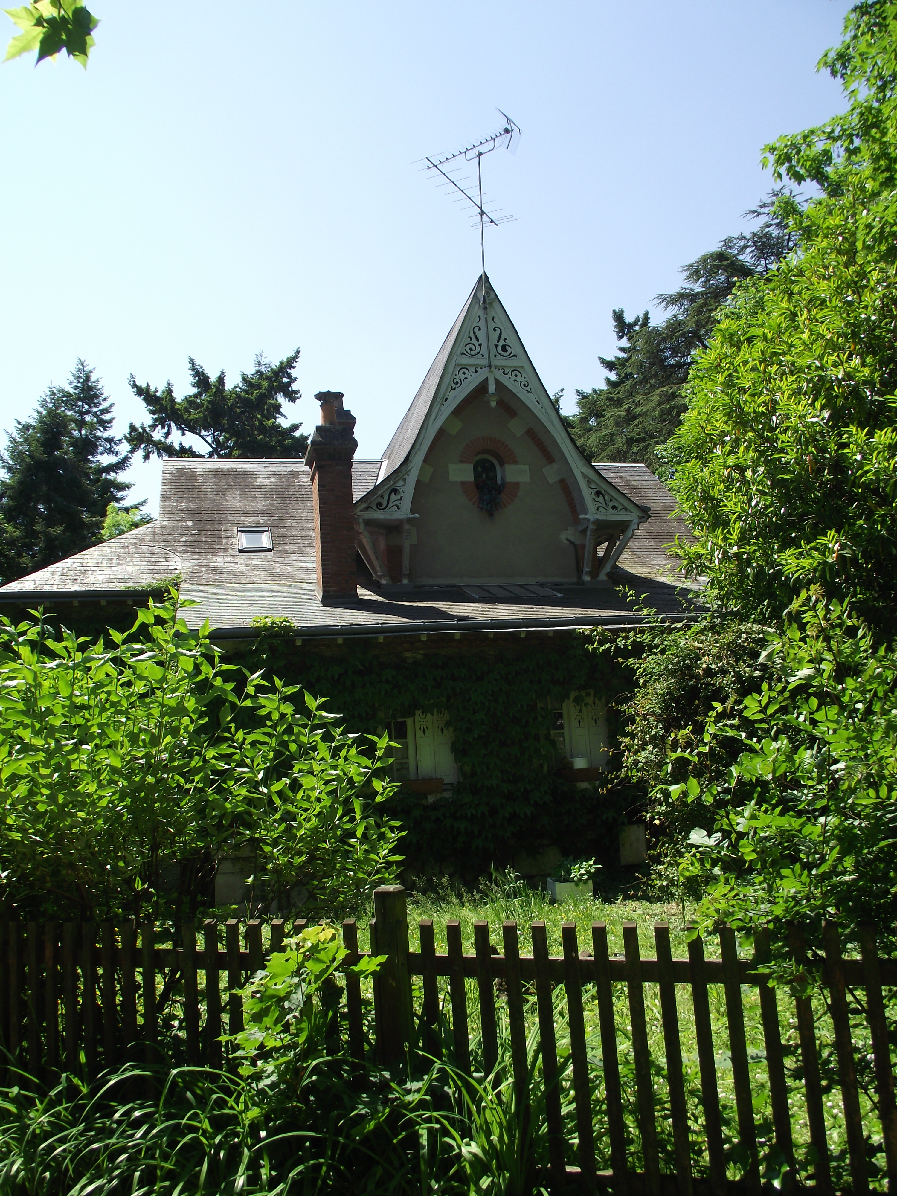 Pavillon « Les Acacias » (ancien hospice Lunier). Construction de pierres et de briques ; toiture avec auvent de bois. Actuelle maison de l'intendant, cité scolaire Augustin-Thierry.